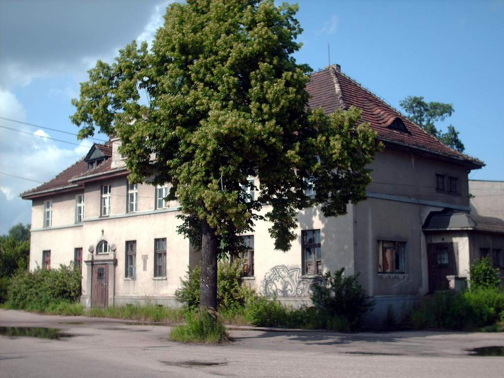 Pozostałości zabudowy dawnych Kaletańskich Zakładów Celulozowo-Papierniczych w Kaletach